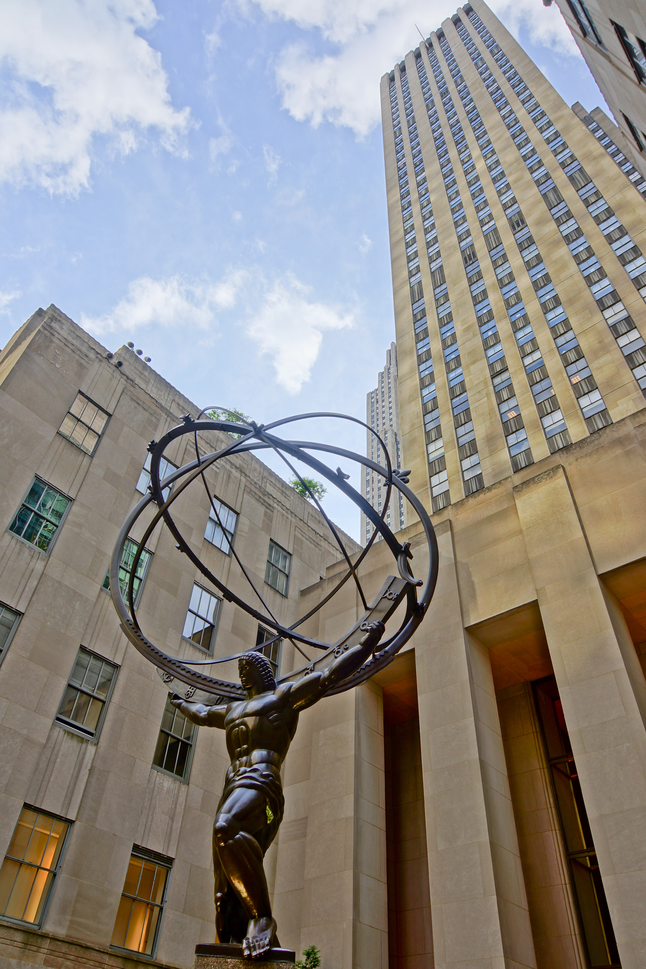 NYC - Rockfeller Center - Statue Atlas devant le Rockfeller Center